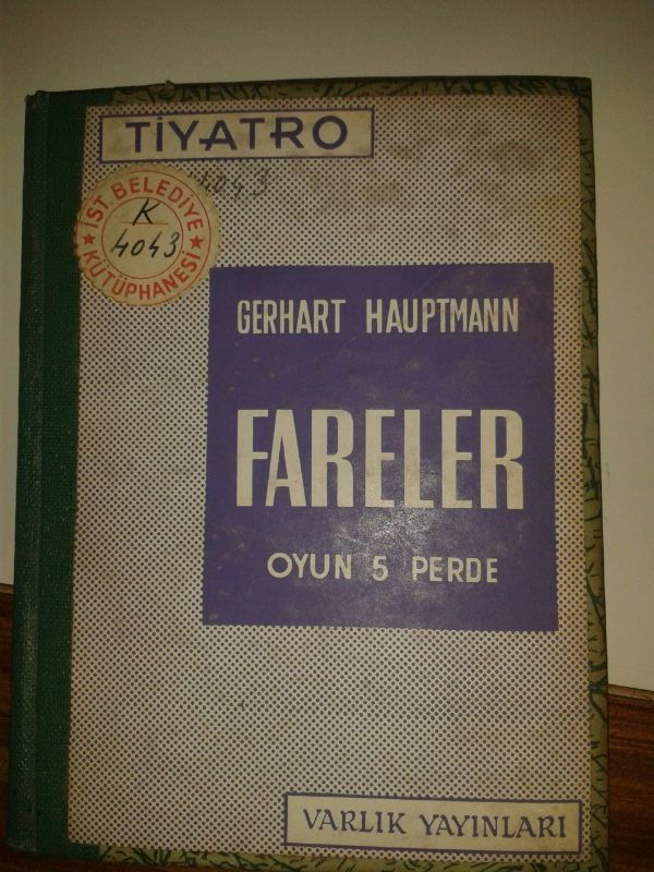 Umschlag der türkischen Übersetzung von Hauptmanns "Die Ratten"/Hauptmann'ın "Fareler" adlı tercümenin kitap kapağının fotoğrafı